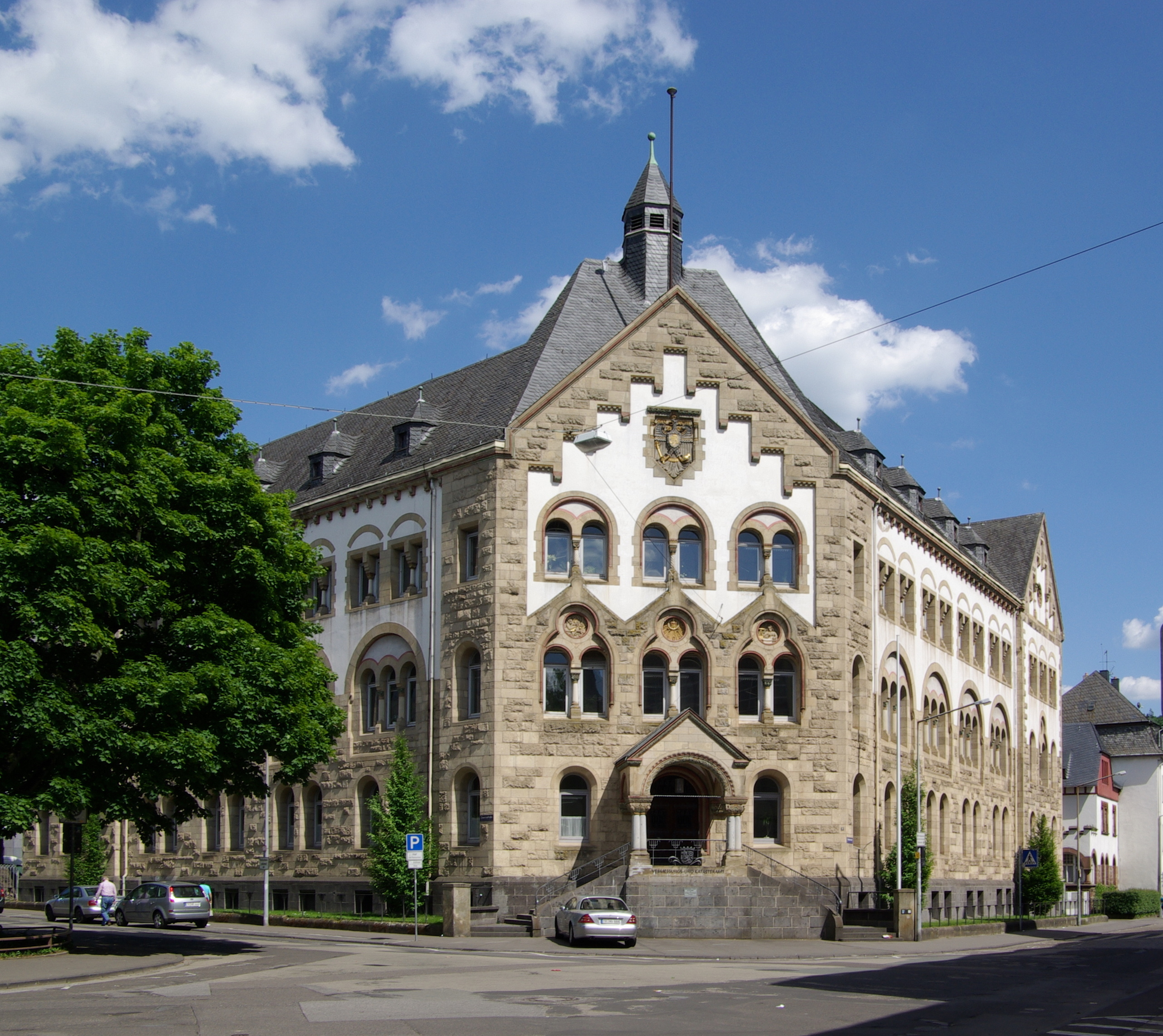 Trier, Sichelstraße 8: sogenannte Neue Regierung; Katasterverwaltung und Steuerabteilung der Königlichen Regierung; großvolumiger neuromanischer Gelenkbau, dreiachsige Eckfassade, dreiachsige Giebelrisalite als Abschluss der Flügelbauten, bezeichnet 1905, Architekt Jaffke; straßenbildprägend